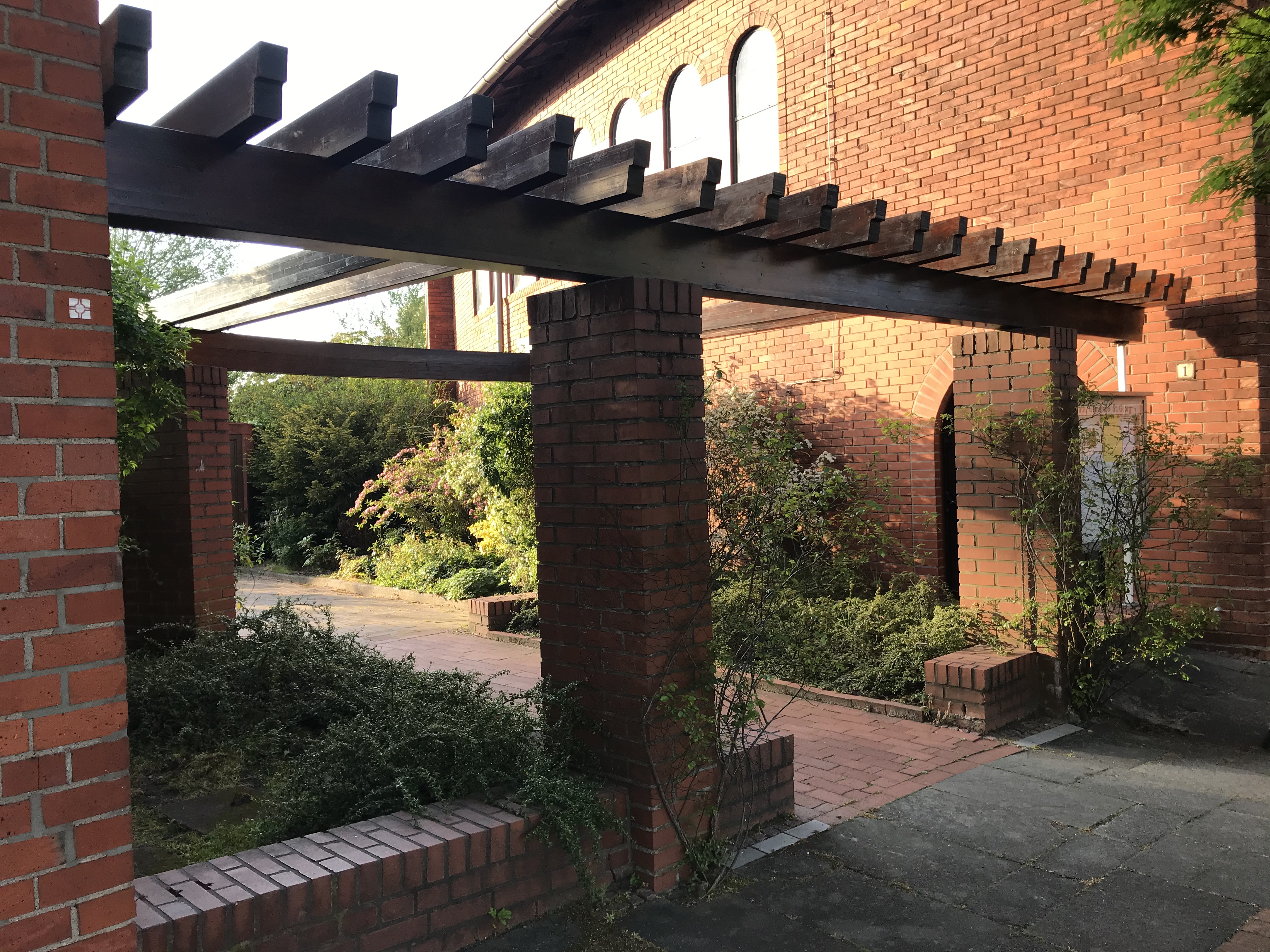 St. Georg alter Zwischenbau von Kirche und Turm